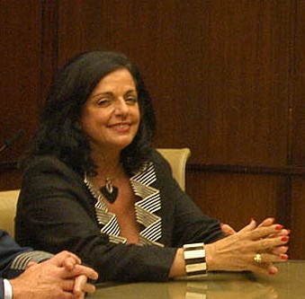 La presidenta electa Cristina Fernández reunida con la ministra de Defensa Nilda Garré, el Jefe de Gabinete Alberto Fernández y representantes de las Fuerzas Armadas